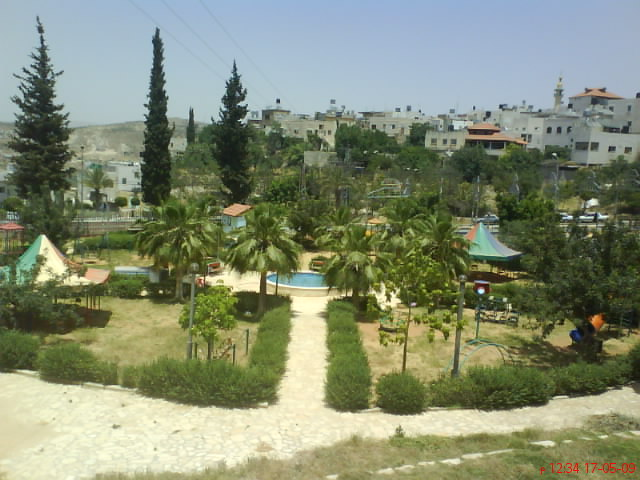 بلدة قبلان - حديقة قبلان